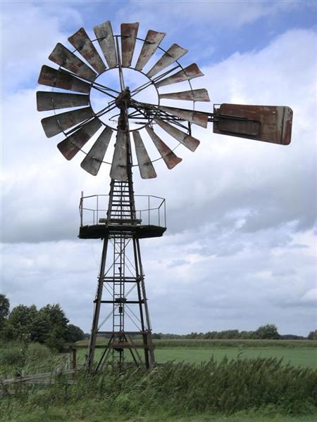 Windmotor bij Sint-Nicolaasga